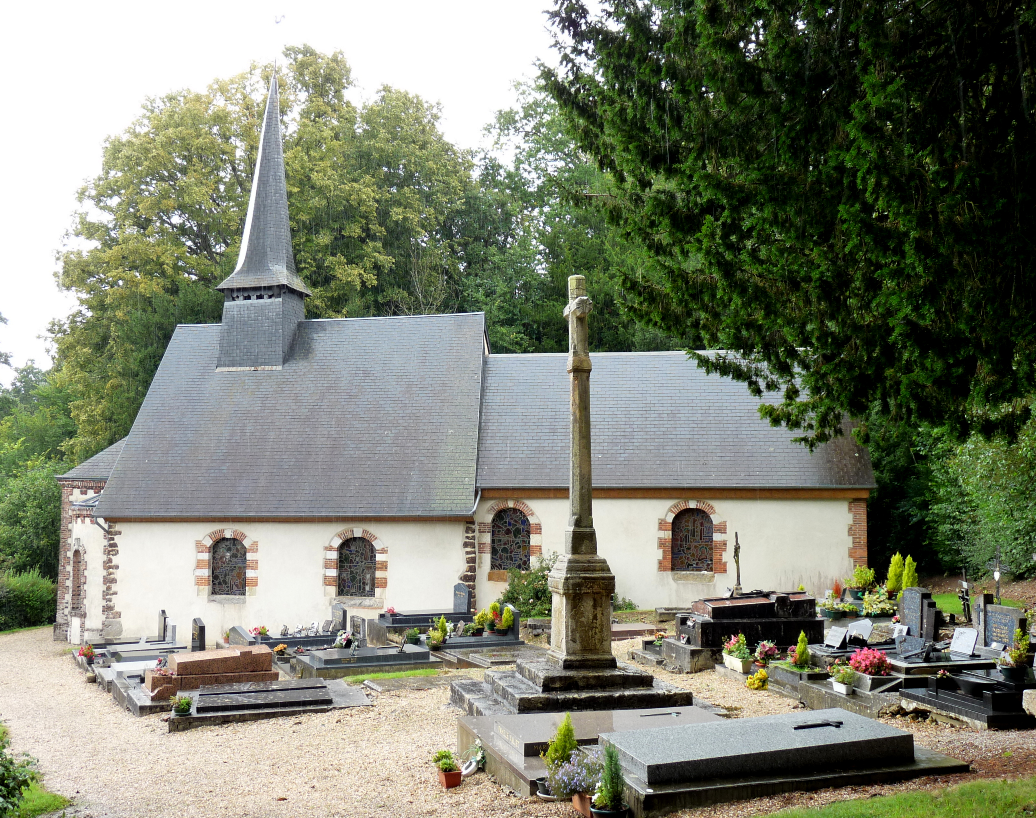 Église Saint-Denis de Saint-Denis-d'Augerons. Les vitraux sont l'œuvre de François Décorchemont.